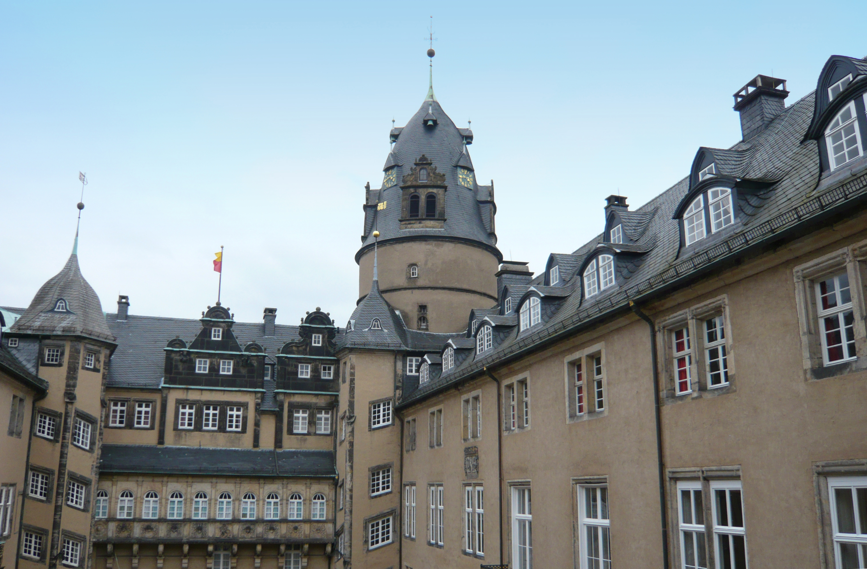 Fürstliches Residenzschloss Detmold, Ansicht des Innenhofs mit Treppentürmen.